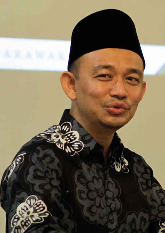 Maszlee Malik ketika berucap di Universiti Malaysia Sarawak